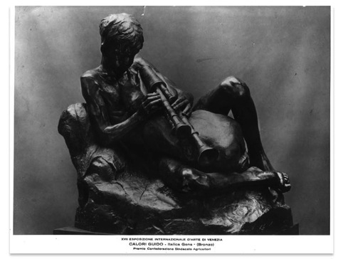 Scultura in bronzo intitolata "Italica gens"